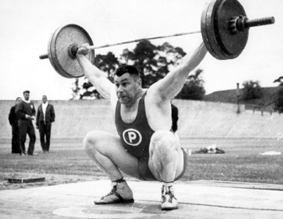 Eino Matias Mäkinen